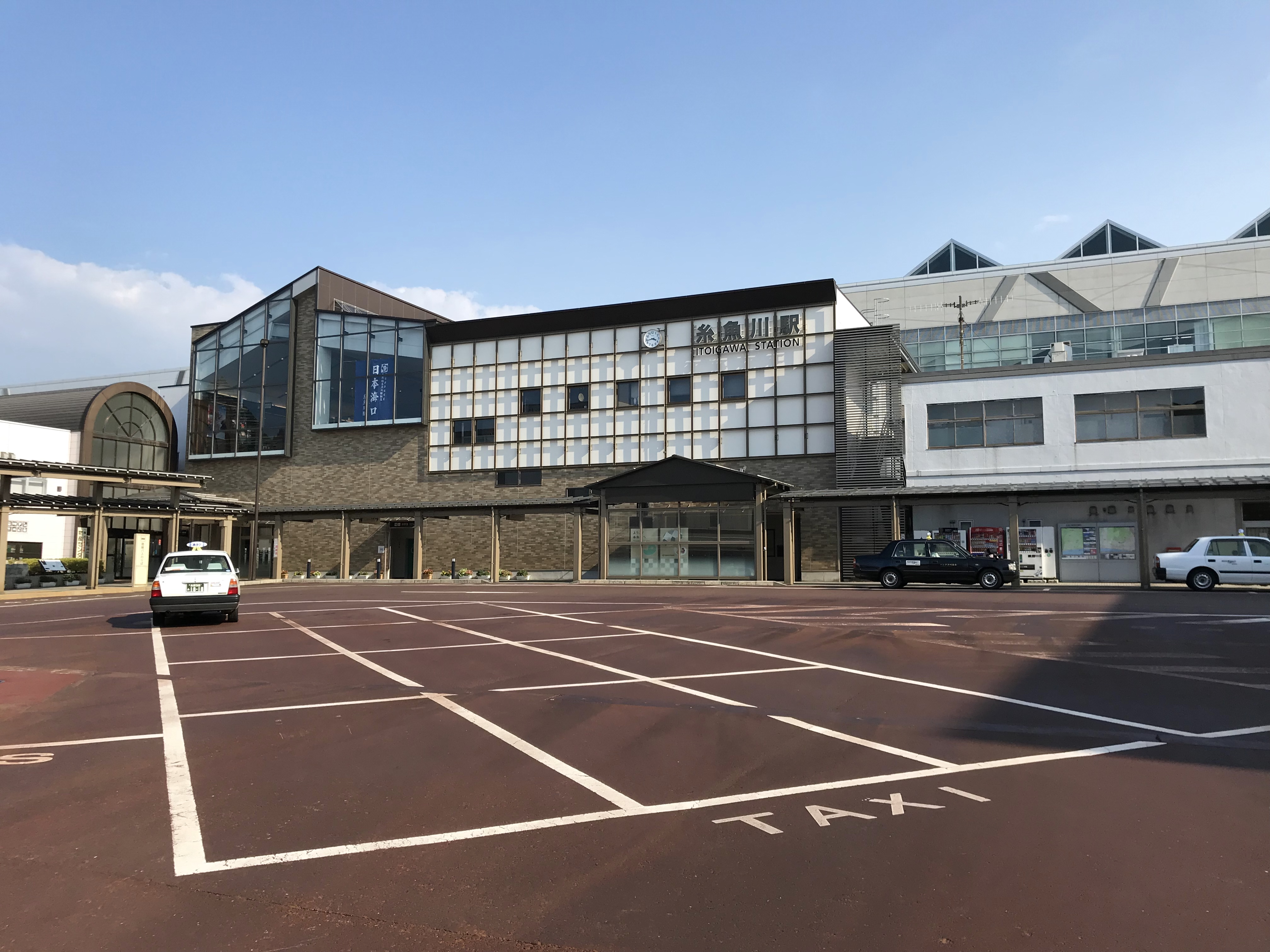 JR西日本・えちごトキめき鉄道糸魚川駅日本海口